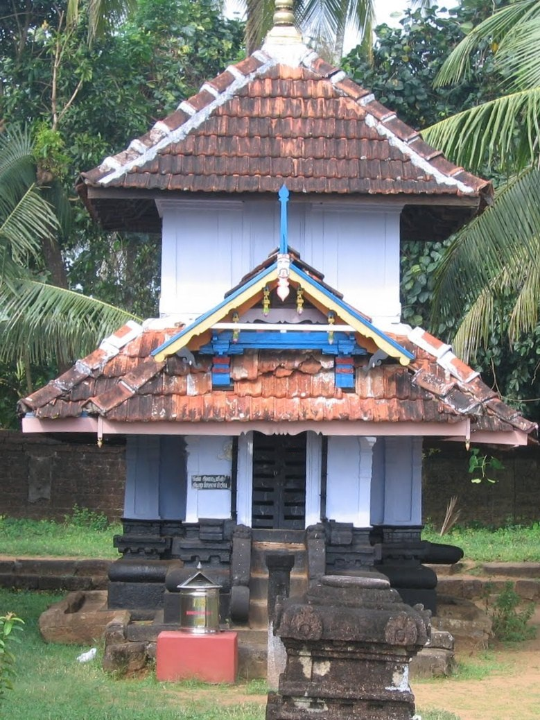 അഞ്ചുമൂർത്തിക്ഷേത്രം വിഷ്ണു-ഭീമപ്രതിഷ്ഠ